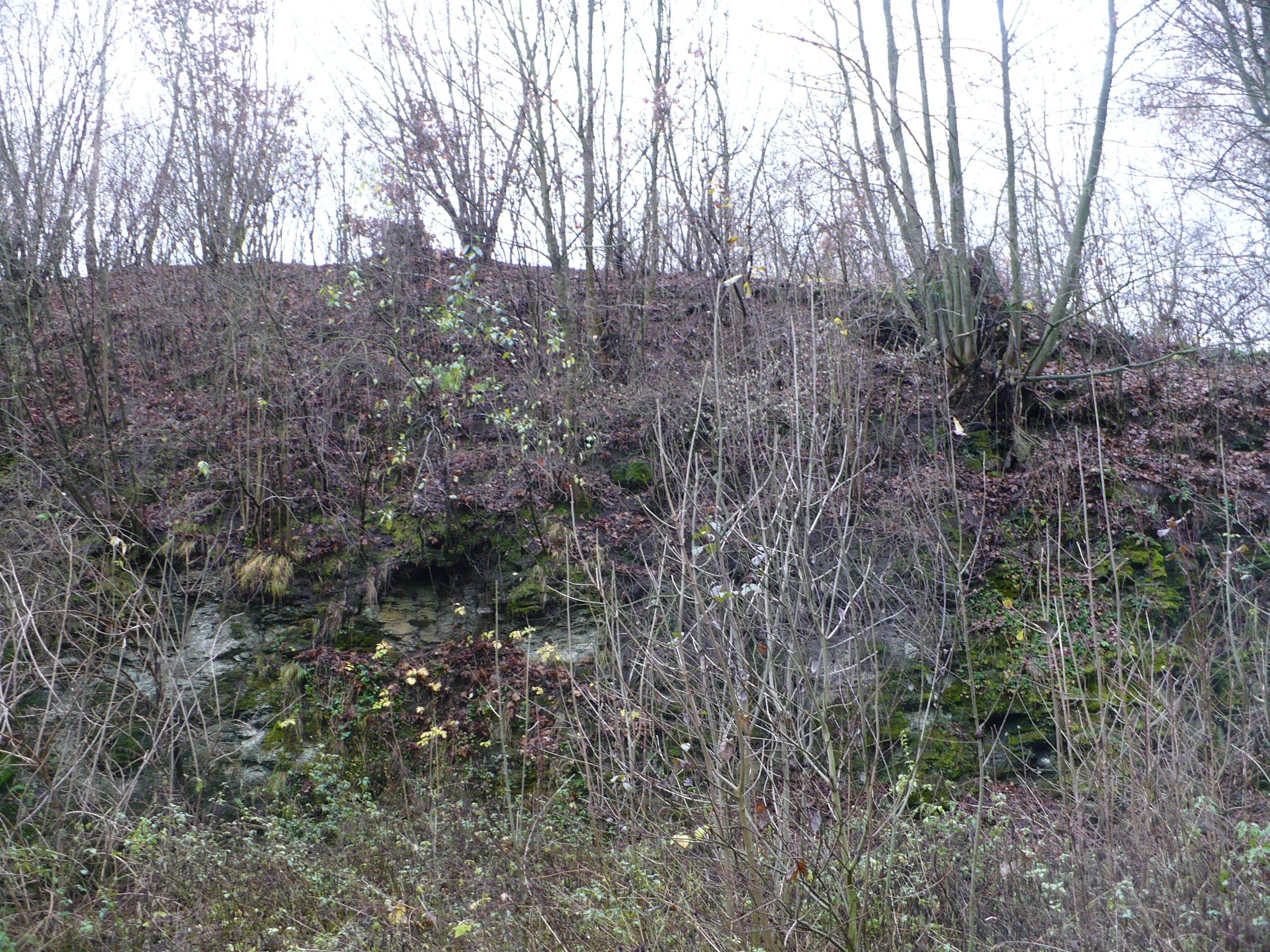 Prostory Kovářova mlýna jsou místy značně zarostlé náletovými dřevinami.